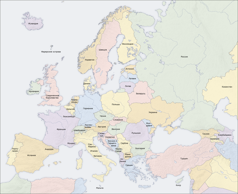 Корректировка обозначения государств